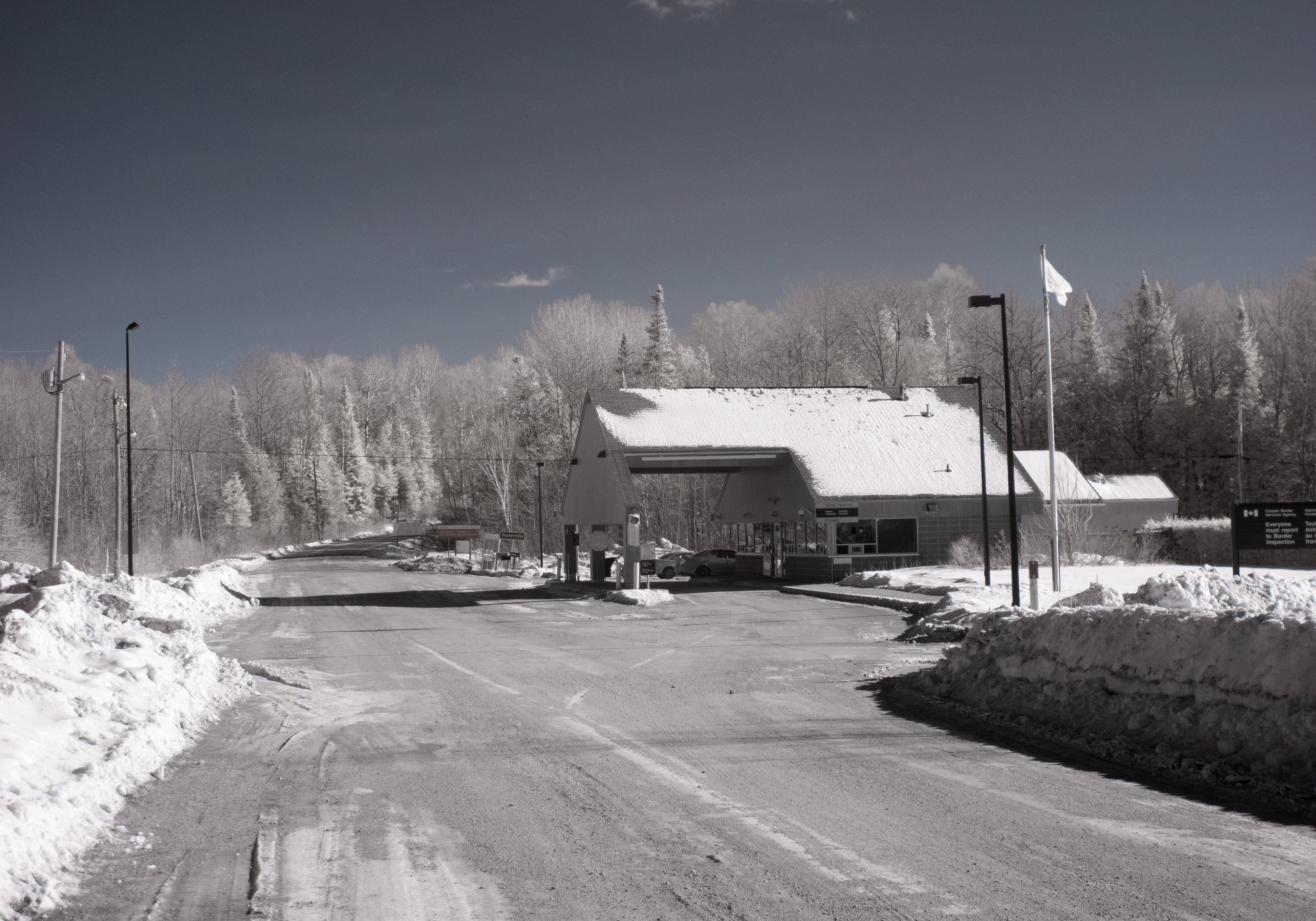 Canada Customs @ Fosterville